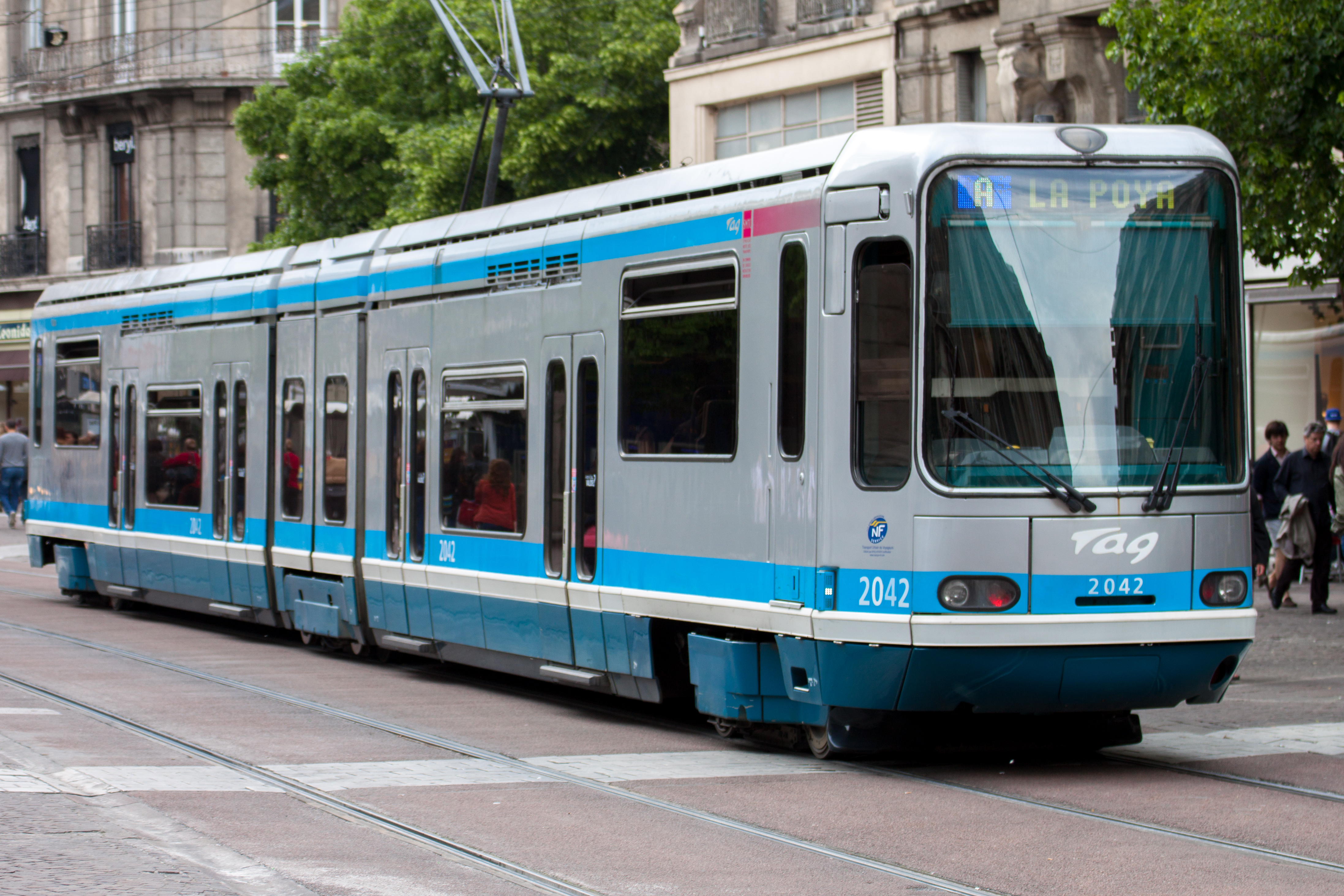 TFS 2042 de la TAG à l'arrêt Victor Hugo.